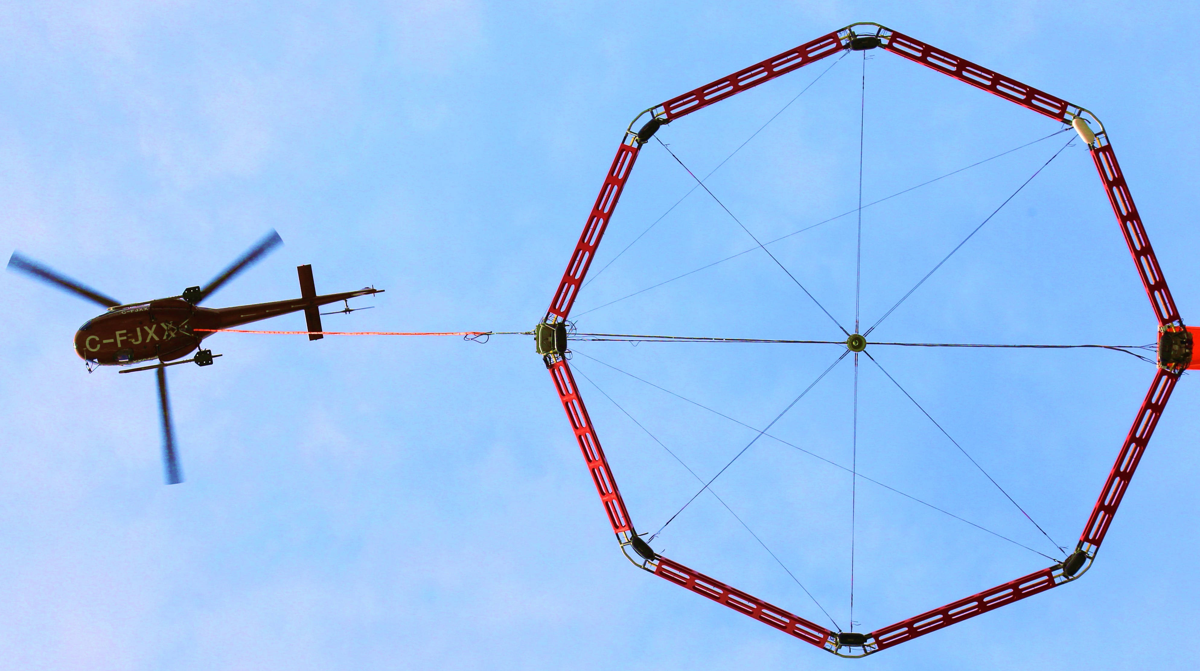 Système héliporté de mesures électromagnétiques dans le domaine temps de Novatem Inc.